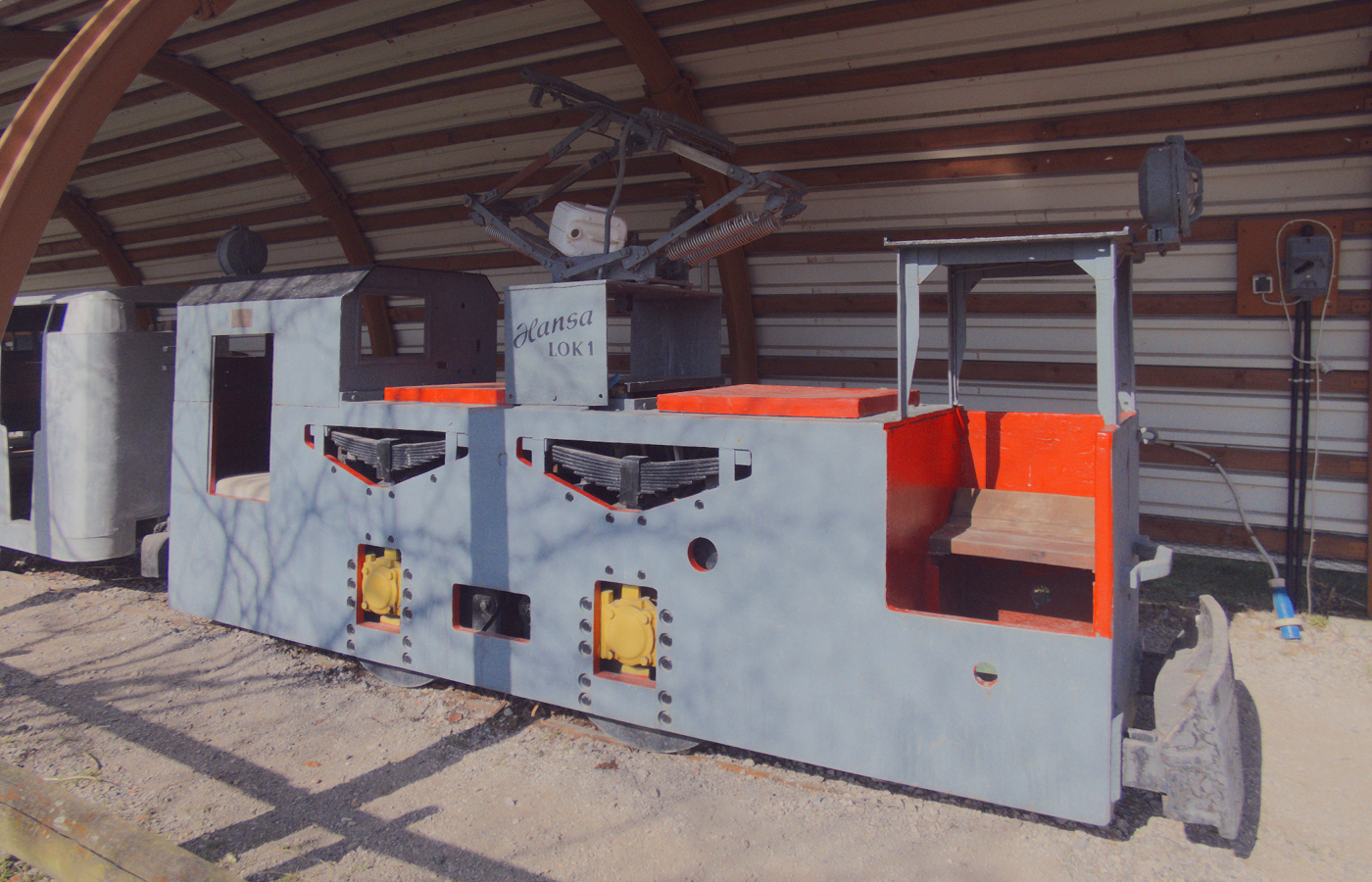 Grubenbahnlok des Niedersächsischen Museums für Kali- und Salzbergbau.